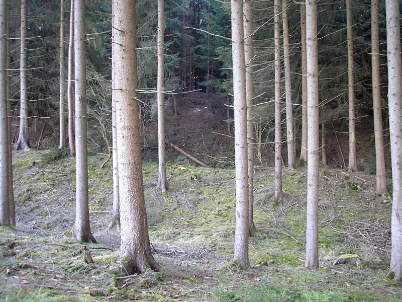 Frühmittelalterliche Abschnittsbefestigung "Pfarrerschanze" bei Todtenweis (Landkreis Aichach-Friedberg, Bayerisch-Schwaben). Das gestaffelte Wallsystem des Hauptwerkes von Osten. Eigene Aufnahme, Feb. 2008 / Early Middle Ages hill fort "Pfarrerschanze" near Todtenweis (Landkreis Aichach-Friedberg, Bavaria, Germany). The central earthworks from the east. Own photo, Feb. 2008